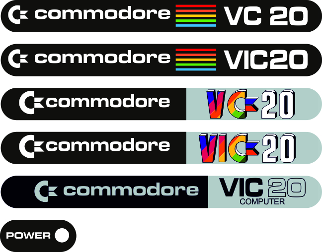 Commodore VIC20 / VC20 Logo